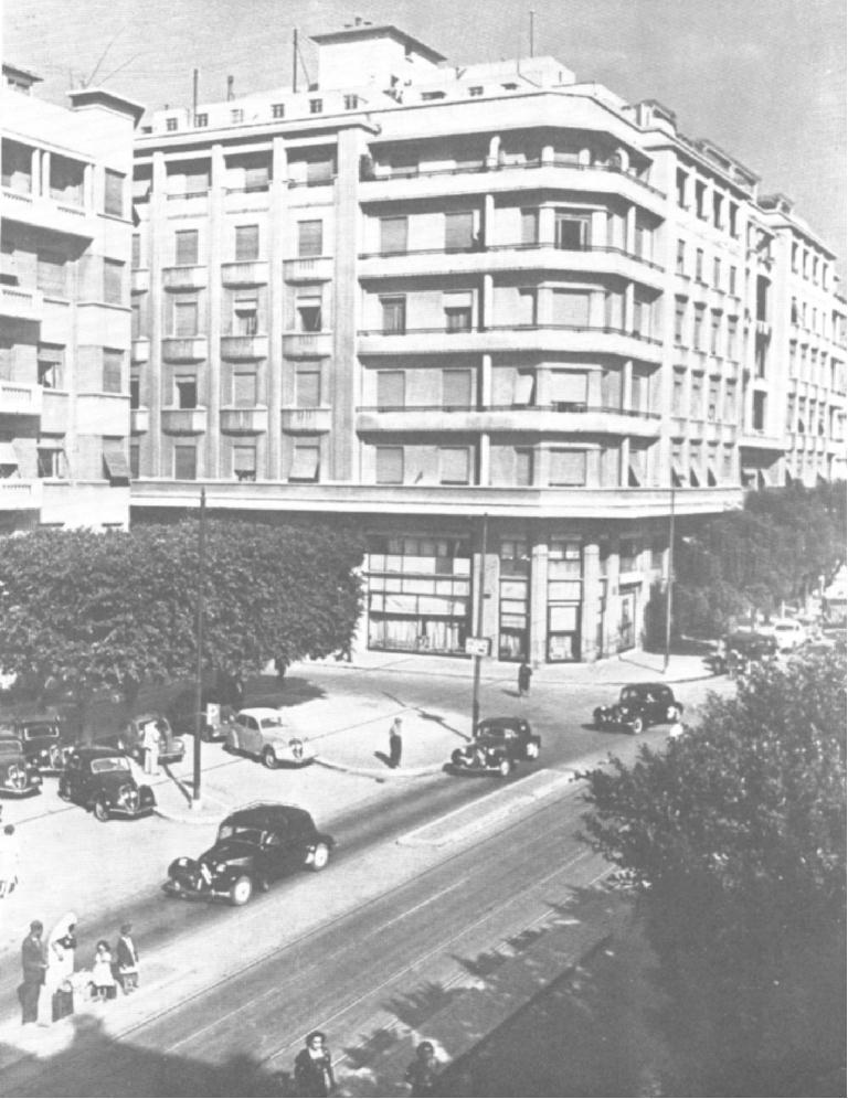 L'avenue de Carthage, Tunis, Tunisie